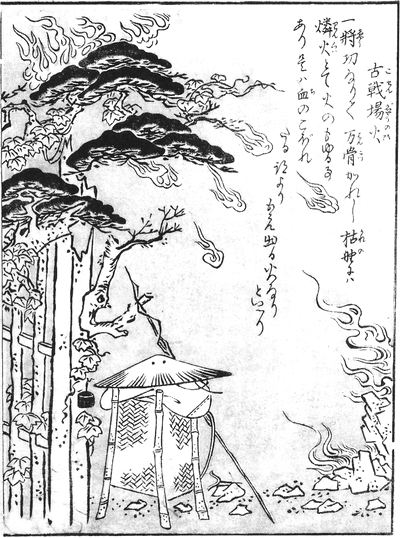 Kosenjōnohi (古戦場火) from the Konjaku Gazu Zoku Hyakki (今昔画図続百鬼)